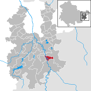 Neumühle/Elster in Thuringia - District Greiz